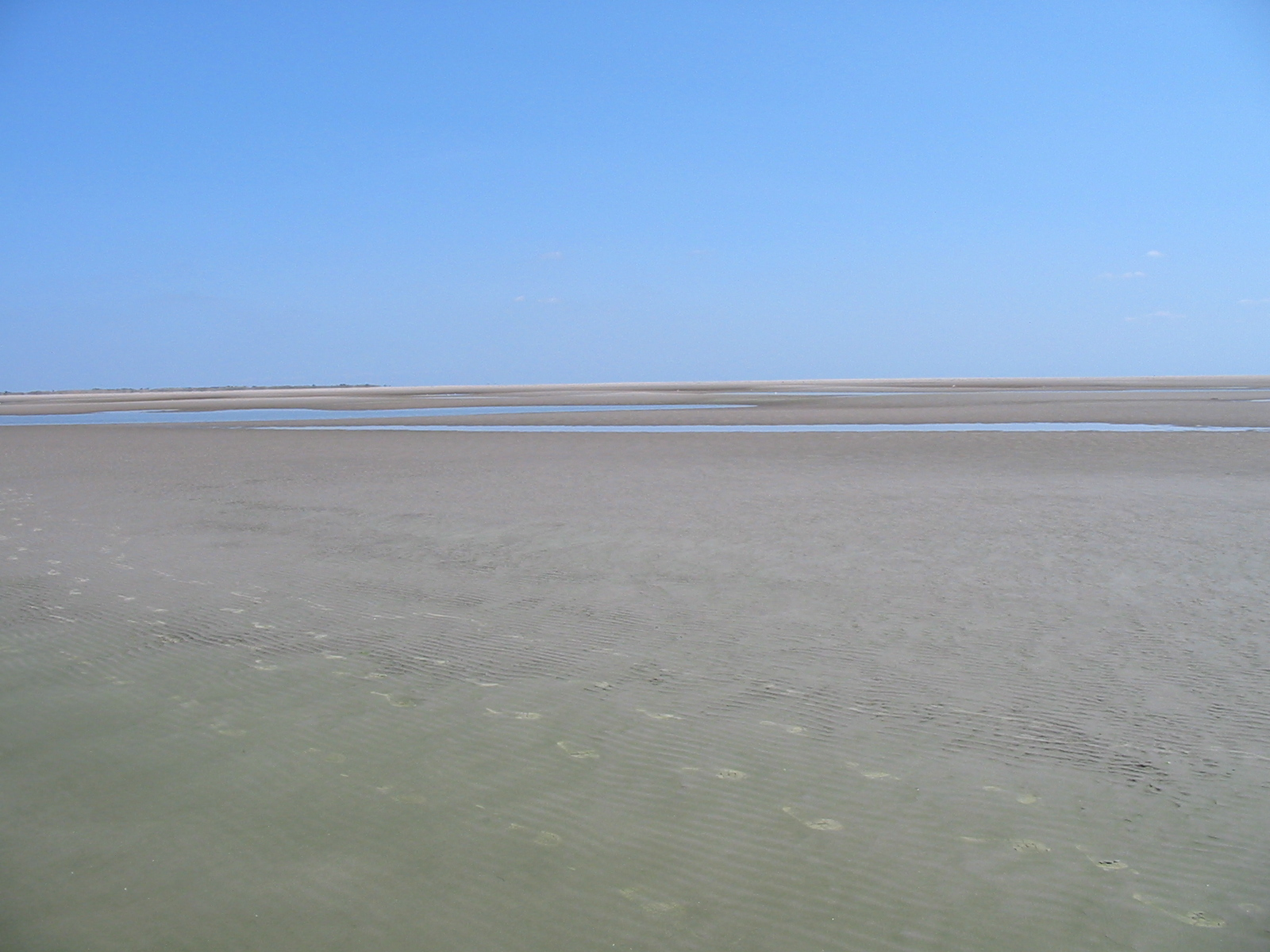 Sandbank Koresand südwestlich der Insel Mandø in Dänemark bei Ebbe. Hinten links sind die Dünen der Insel Mandø zu erahnen. Koresand ist um die 10 km² groß.